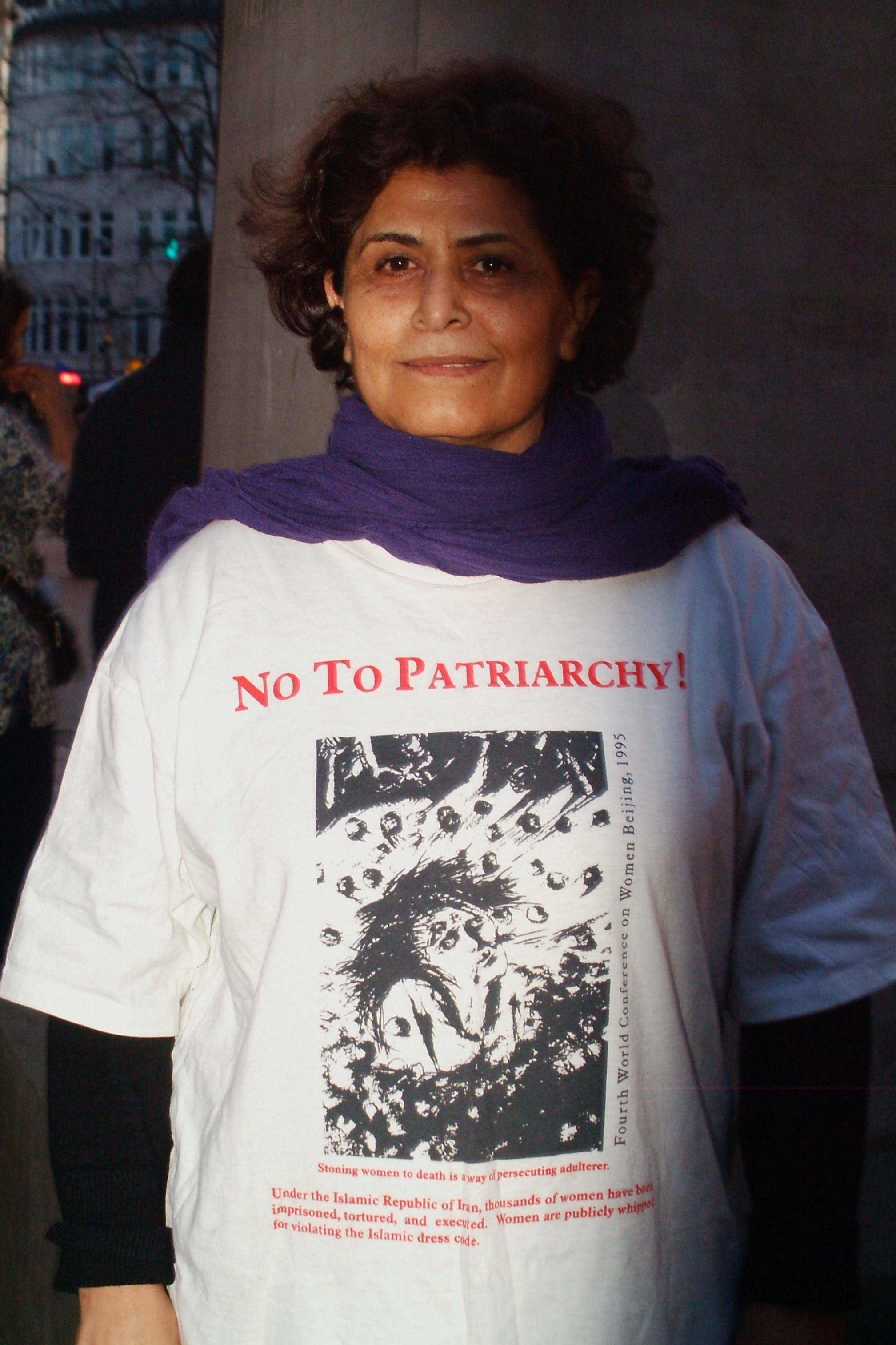 Teilnehmerin an der InterKoneXiones 2012 in Hannover mit einem T-Shirt mit der Aufschrift "NO TO PATRIARCHY! Under the Islamic Republic of Iran, thousands of women have been imprisoned, tortured, and executed. Women are publicly wipped for violating the islamic dres code. Eine aufgedruckte Zeichnung ist untertitelt "Stoning women to death is a way of persecution adulterer." Daneben: "Fourth World Conference on Women, Beijing, 1995".